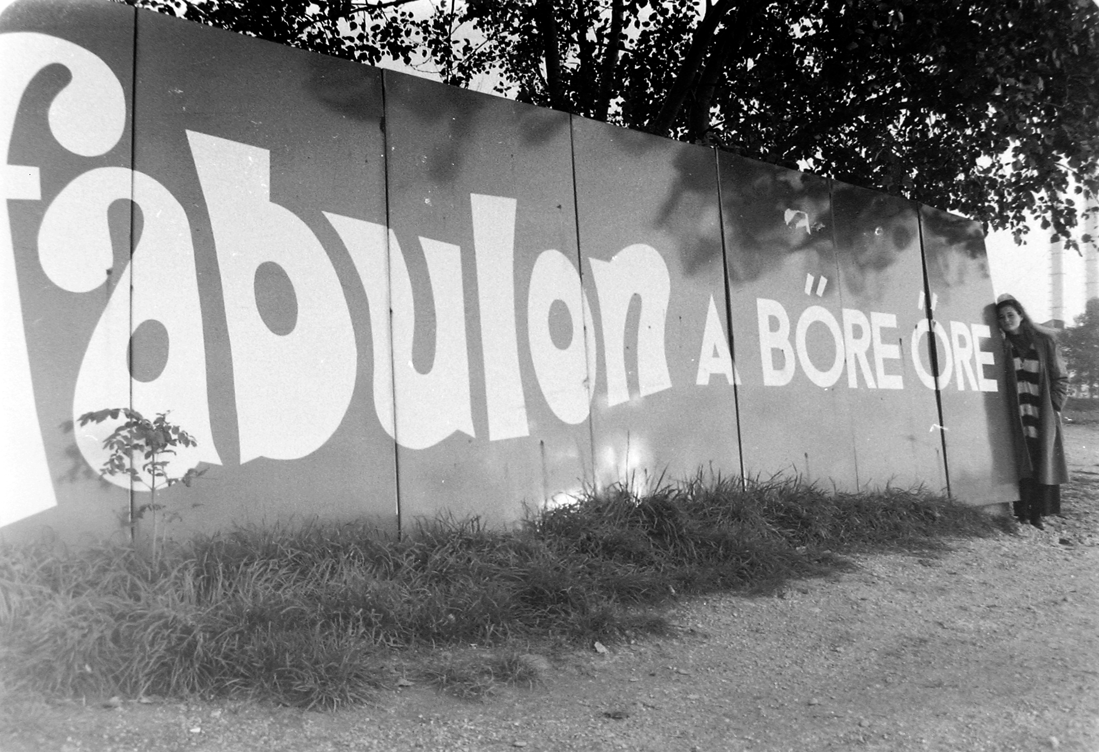 Háttérben a pesti Duna-part, a Révész utcai fűtőmű kettős kéménye. Location: Hungary, Budapest, Margit Islands Tags: ad, trading Title: Háttérben a pesti Duna-part, a Révész utcai fűtőmű kettős kéménye.